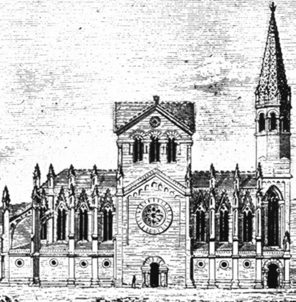 Proyecto de la Sagrada Familia de Francisco de Paula del Villar y Lozano (1882).